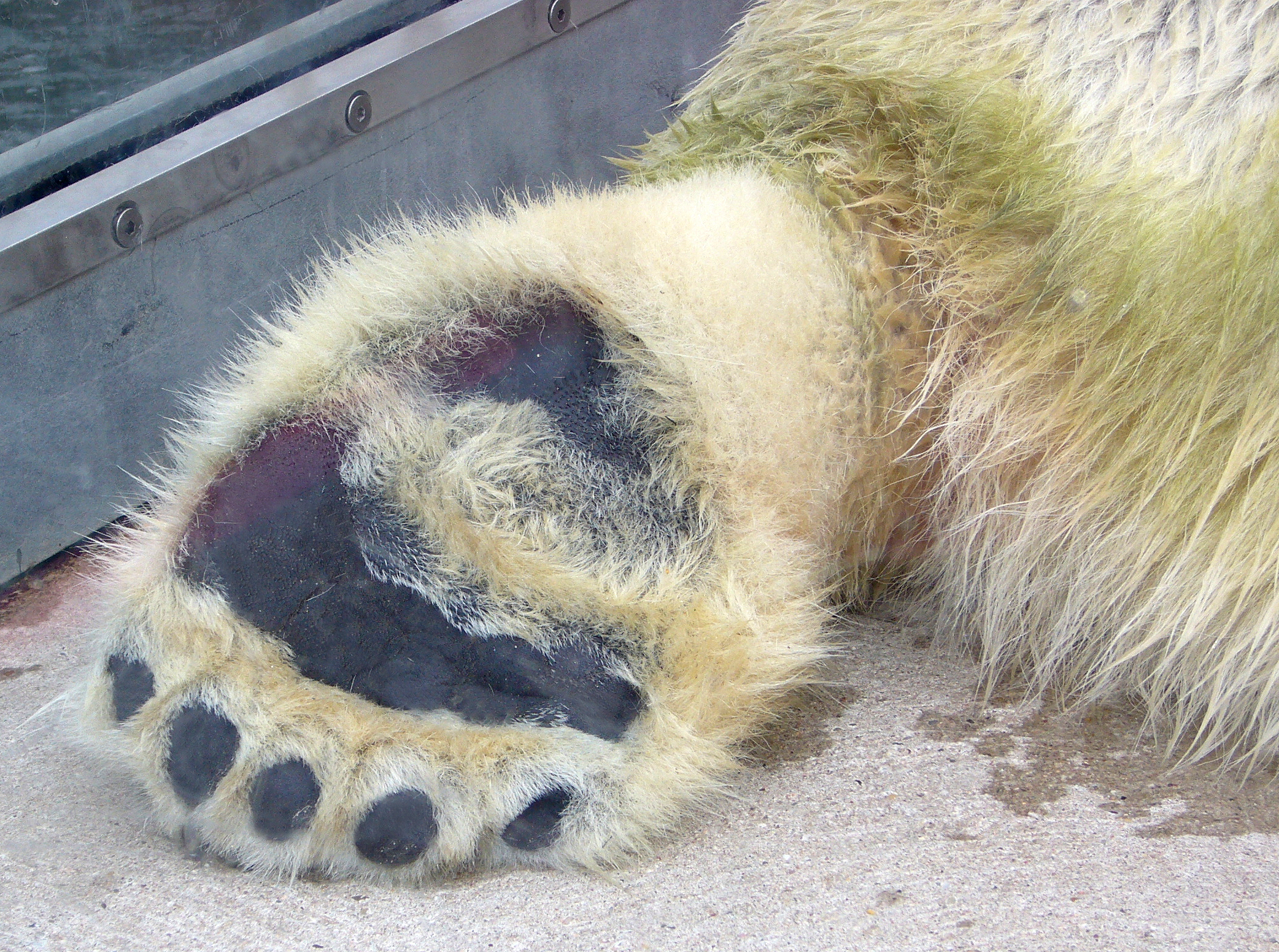 Hintertatze eines Eisbären im Karlsruher Zoo